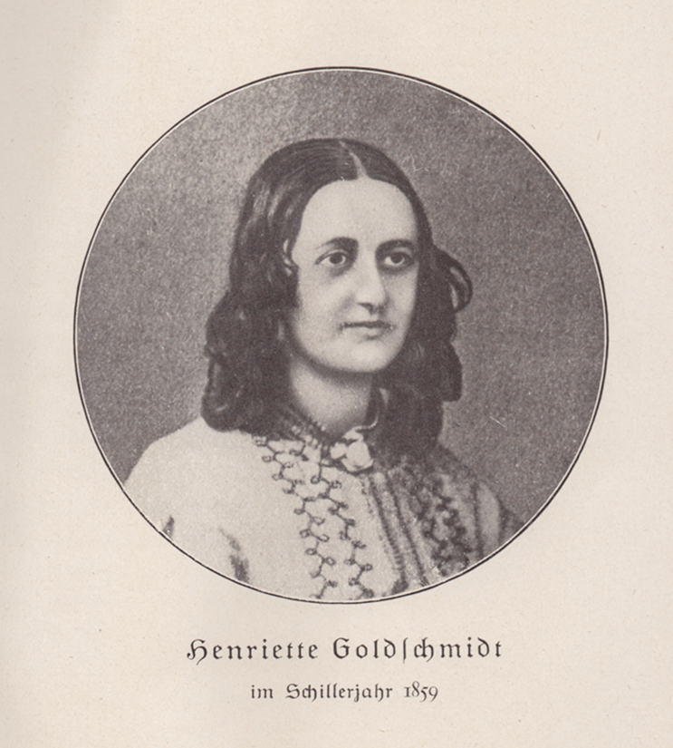 Henriette Goldschmidt im Schillerjahr 1859